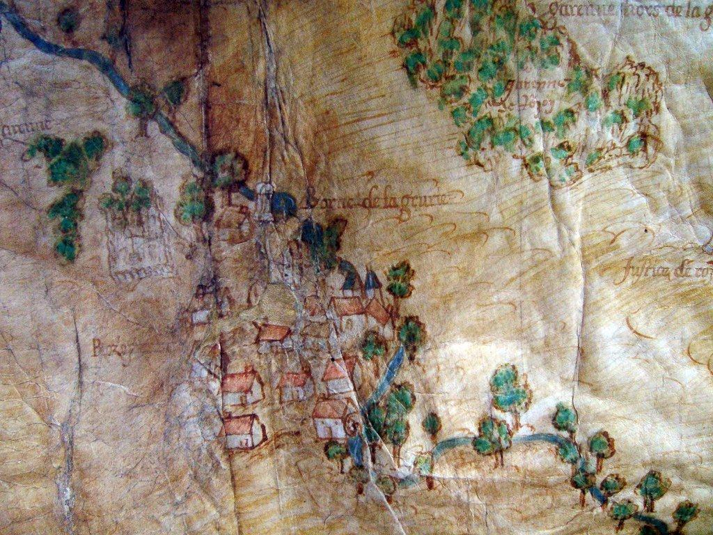 Vue ouest du village, avec au sud la Gergogne, le moulin, la ferme du bas, les tours du château. Plus haut le clocher et au nord le cimetière.